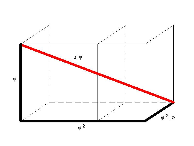 Ortoedro aureo con dimensiones en función de phi